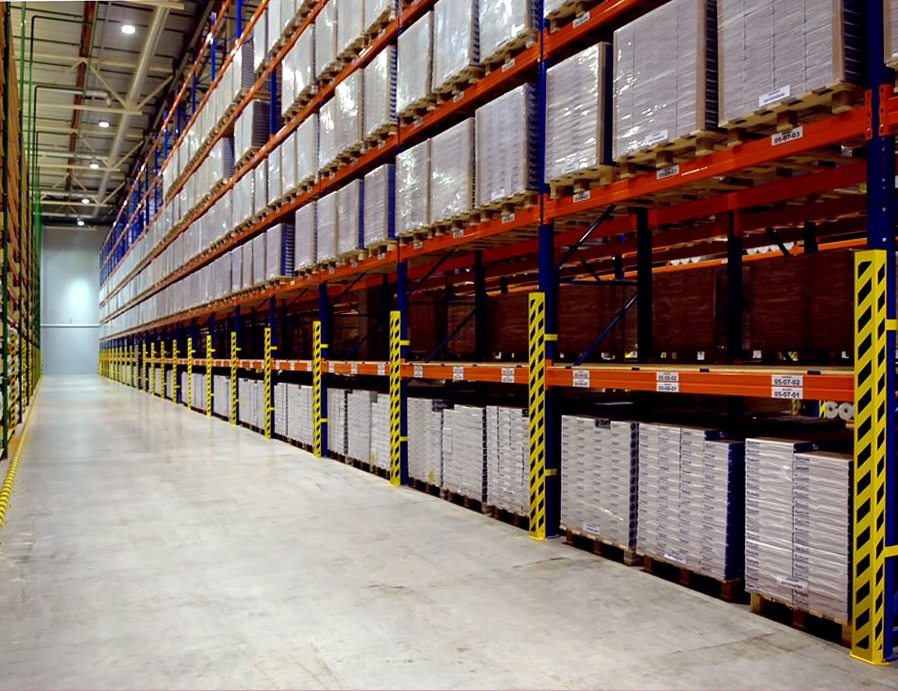 Паллетный